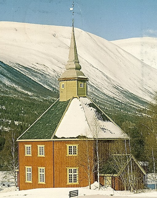 Lønset kapell